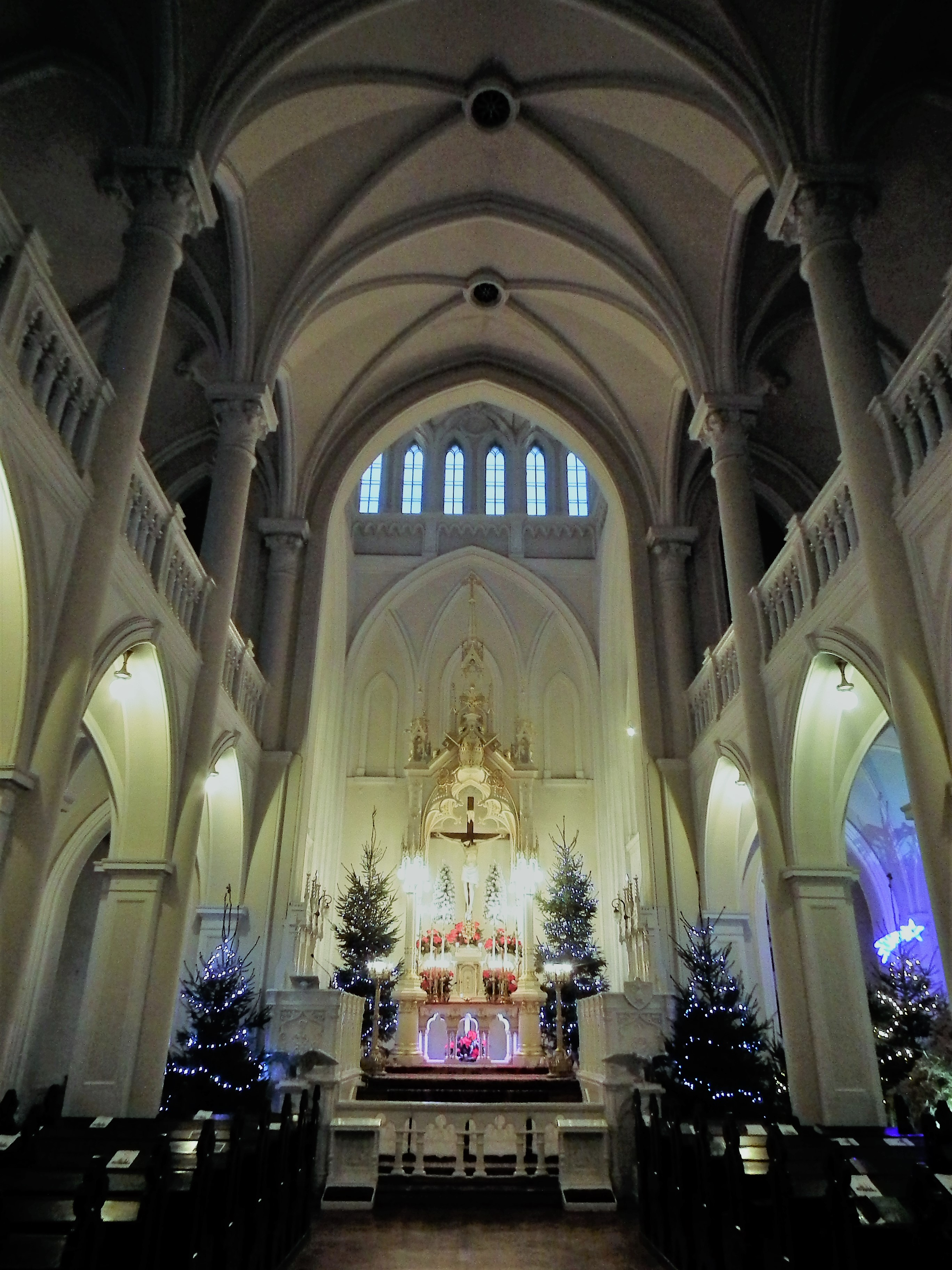 Katedra Mariawitów w Płocku.